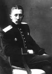 Баторский - фотография